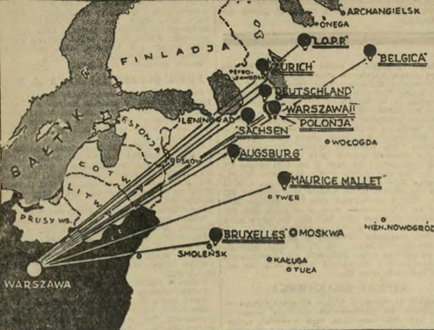 Mapa z zaznaczonymi miejscami lądowania balonów podczas Gordon Bennett Cup 1936